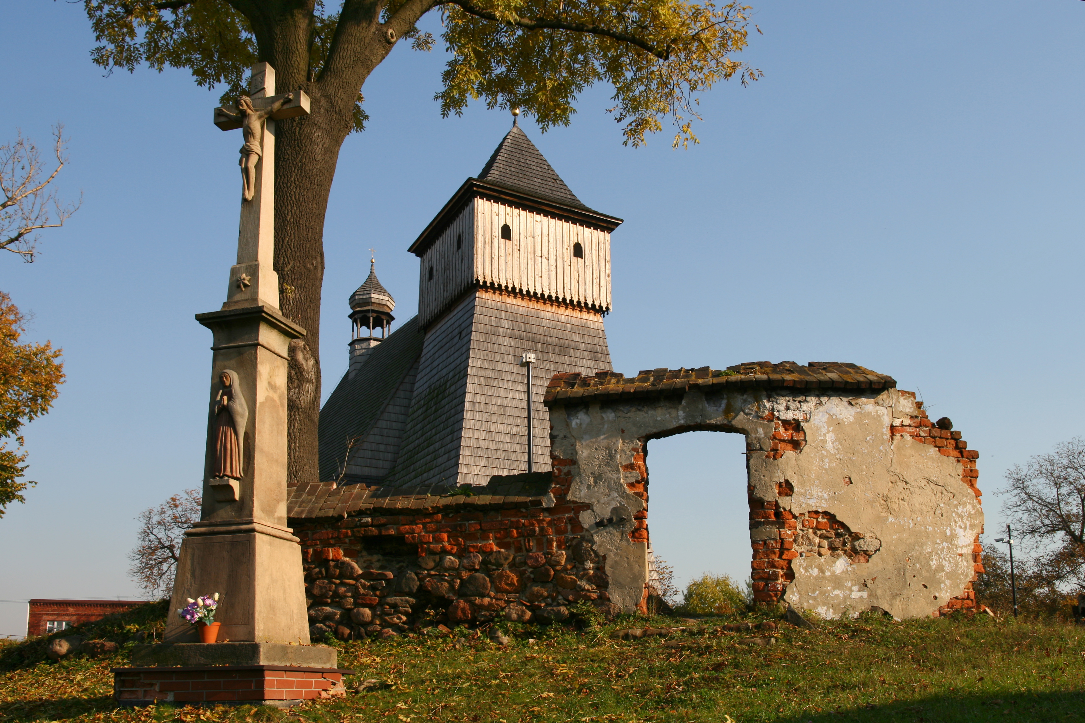 Kościół pw. Św. Jerzego w Gliwicach-Ostropie. Datowany na lata 1640-1668.